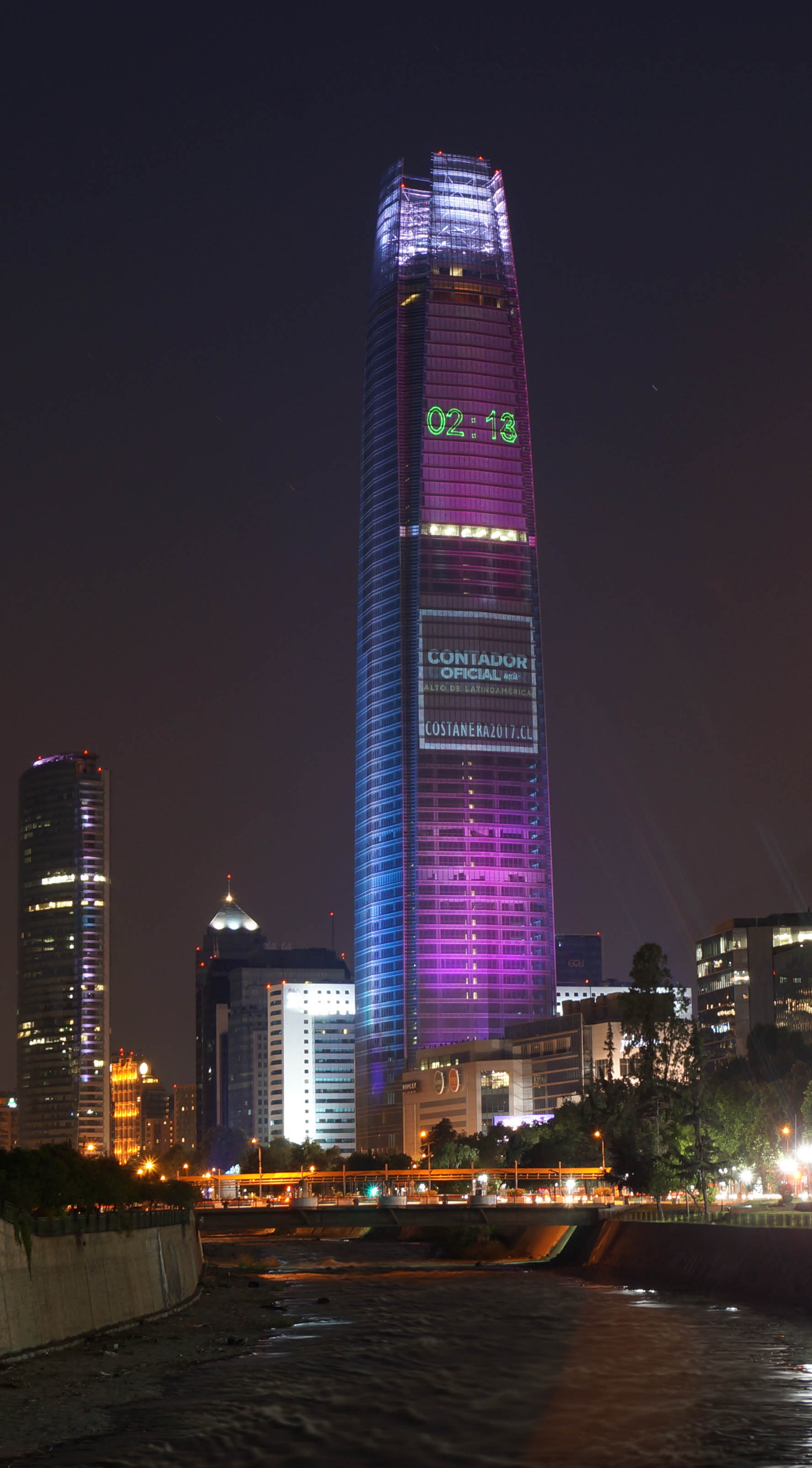 Torre Costanera Center, Ubicada en la comuna de Providencia en la ciudad de Santiago, Chile. Iluminada con motivo de las fiestas navideñas 2016. Fotografía tomada desde el puente Padre Letelier, sobre el río Mapocho.